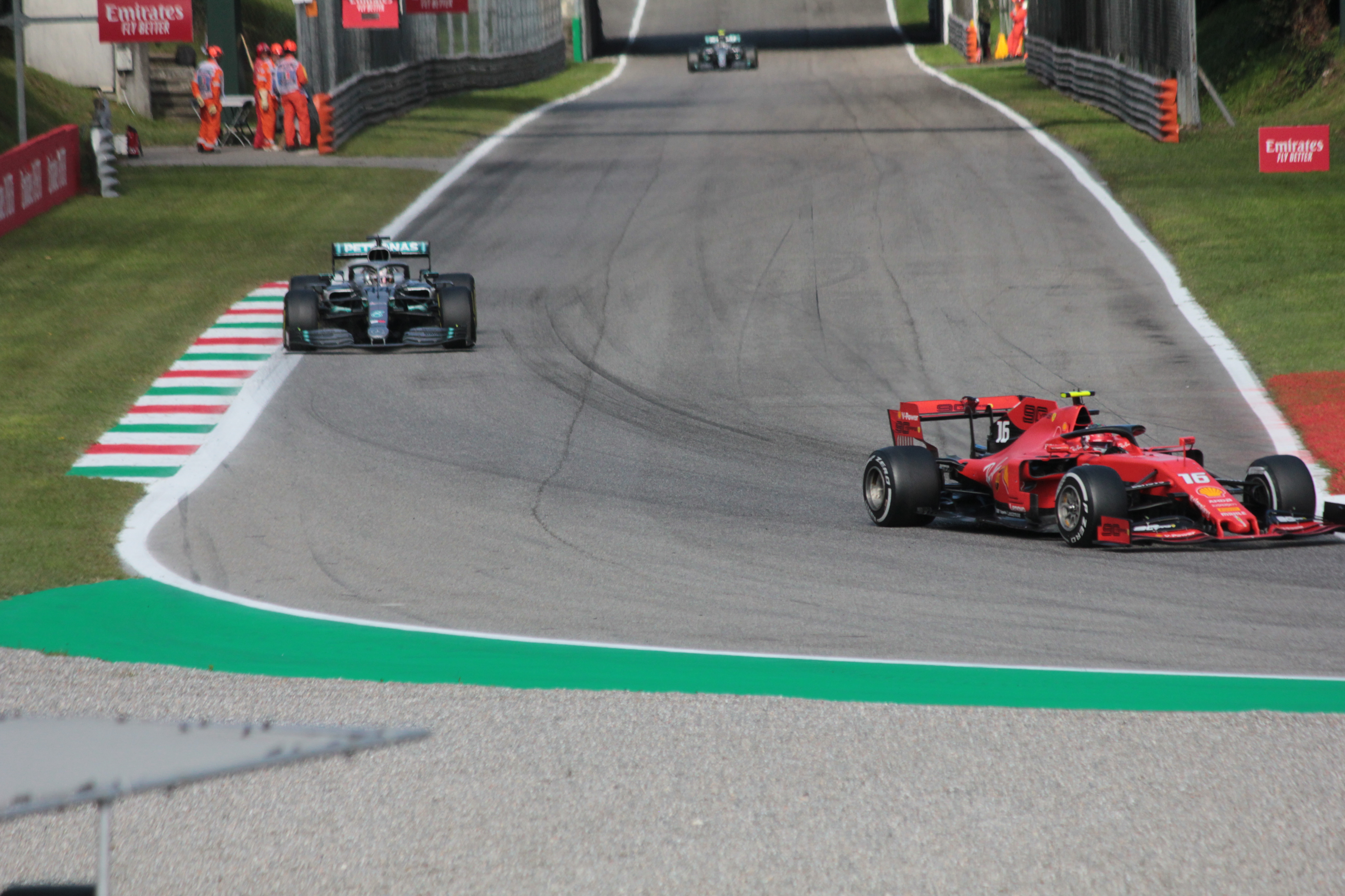 Charles Leclerc inseguito da Lewis Hamilton e Valtteri Bottas durante il Gran Premio d'Italia 2019